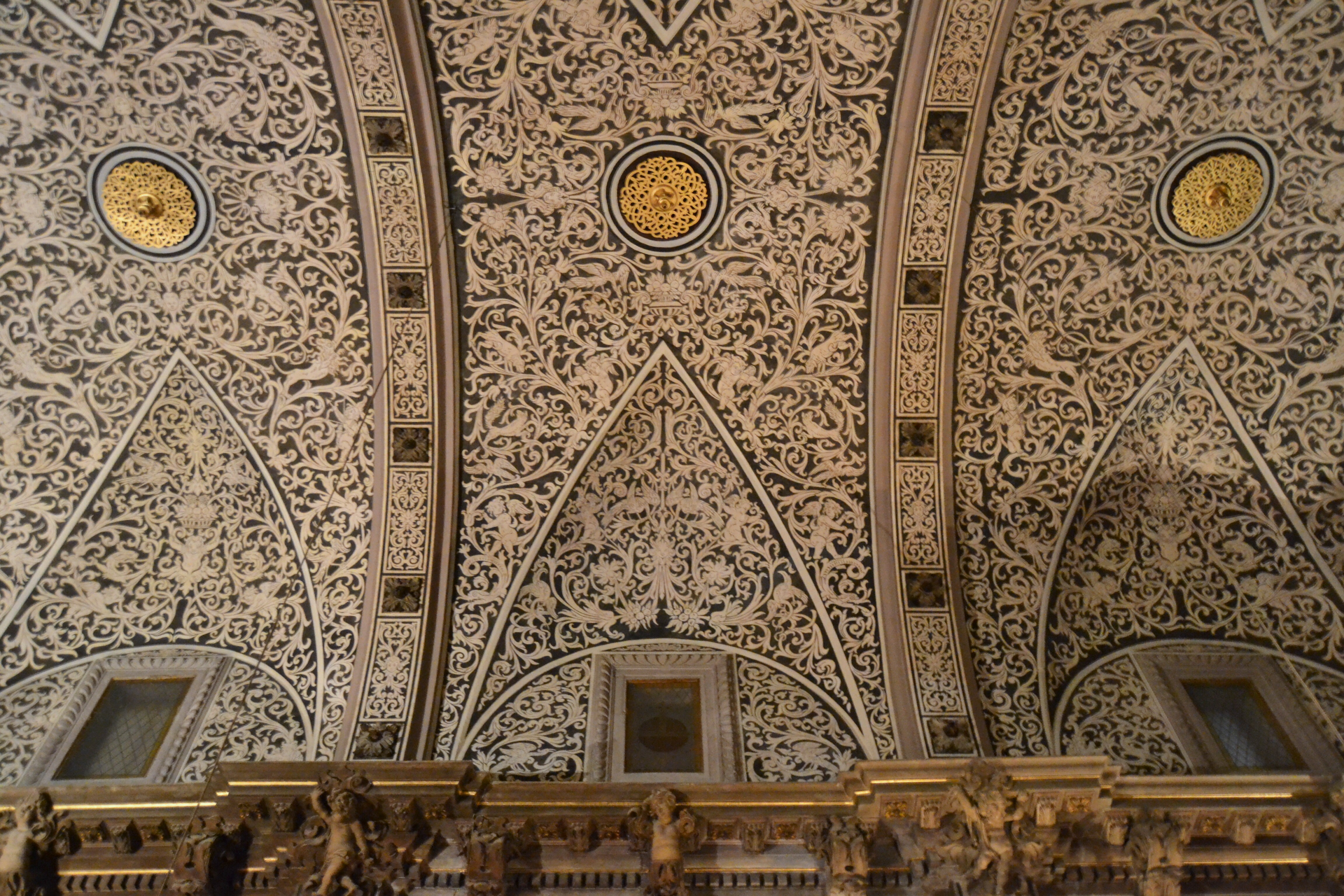 Voltes de l'església del Salvador de Terol.